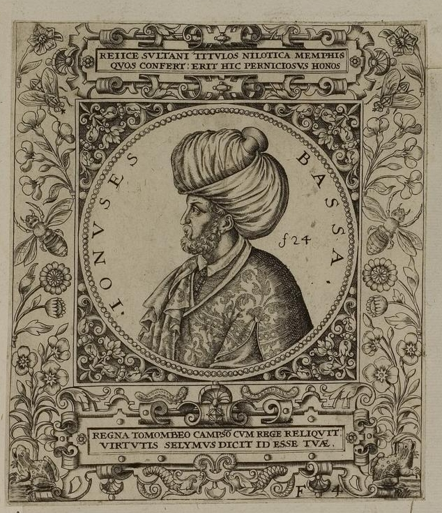 Grafik aus dem Klebeband Nr. 1 der Fürstlich Waldeckschen Hofbibliothek Arolsen Illustration aus: Georg Greblinger: Wahre Abbildungen der Türckischen Kayser vnd Persischen Fürsten / so wol auch anderer Helden und Heldinnen von dem Osman / biß auf den andern Mahomet. Johann Ammon, Frankfurt 1648 Motiv: "Ionuses Bassa" (= Yunus Paşa)